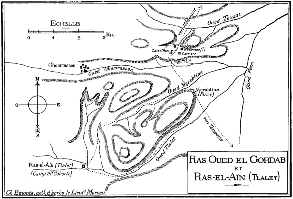 Lieutenant Moreau, carte des environs de Ras-Oued-el-Gordab et Ras-el-Aïn Tlalet (Tunisie), en 1904